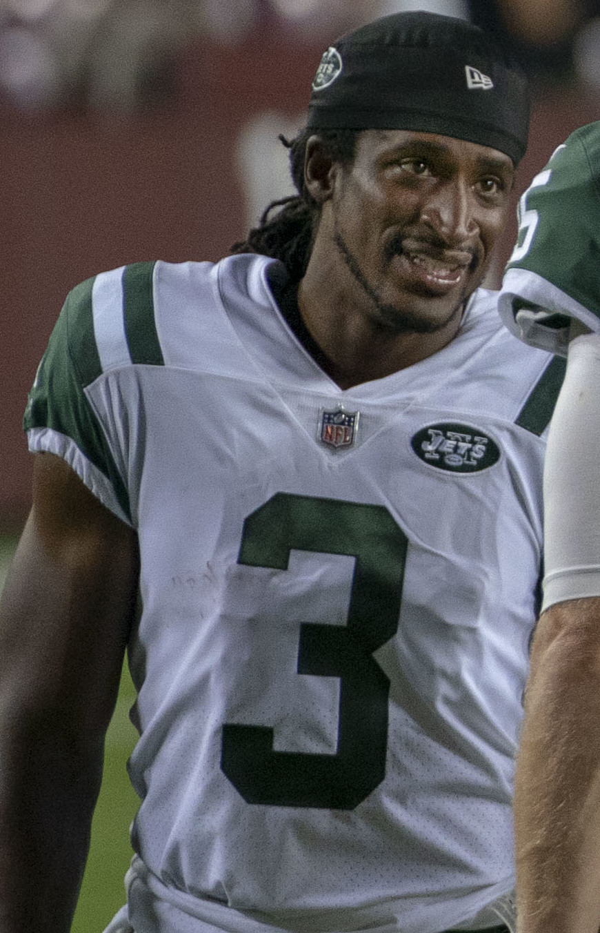 Jets at Redskins 8/16/18